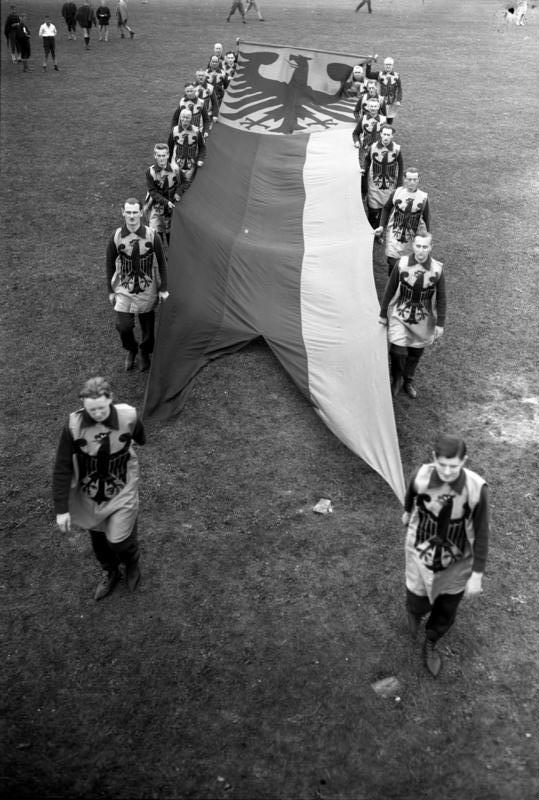 Die grosse Verfassungsfeier am 11. August in Berlin! Eine Riesen-Reichsflagge wird von Herolden bei der Verfassungsfeier im Stadion in dasselbe hereingetragen.